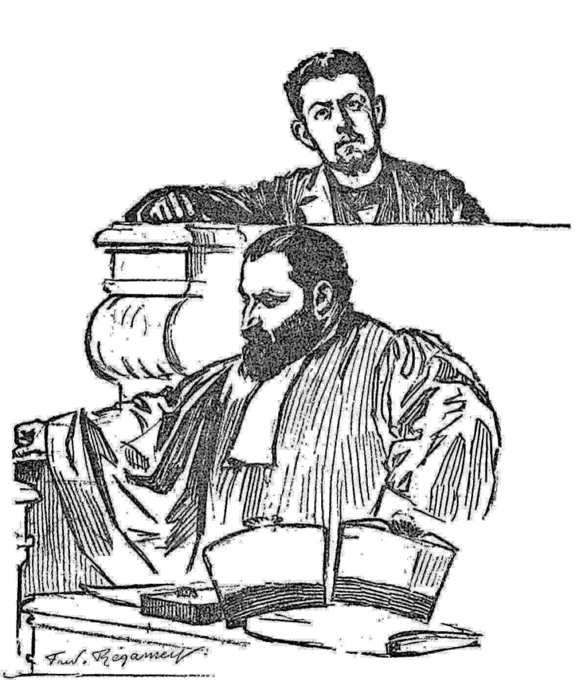 Émile Henry et son avocat, Maître Hornbostel.